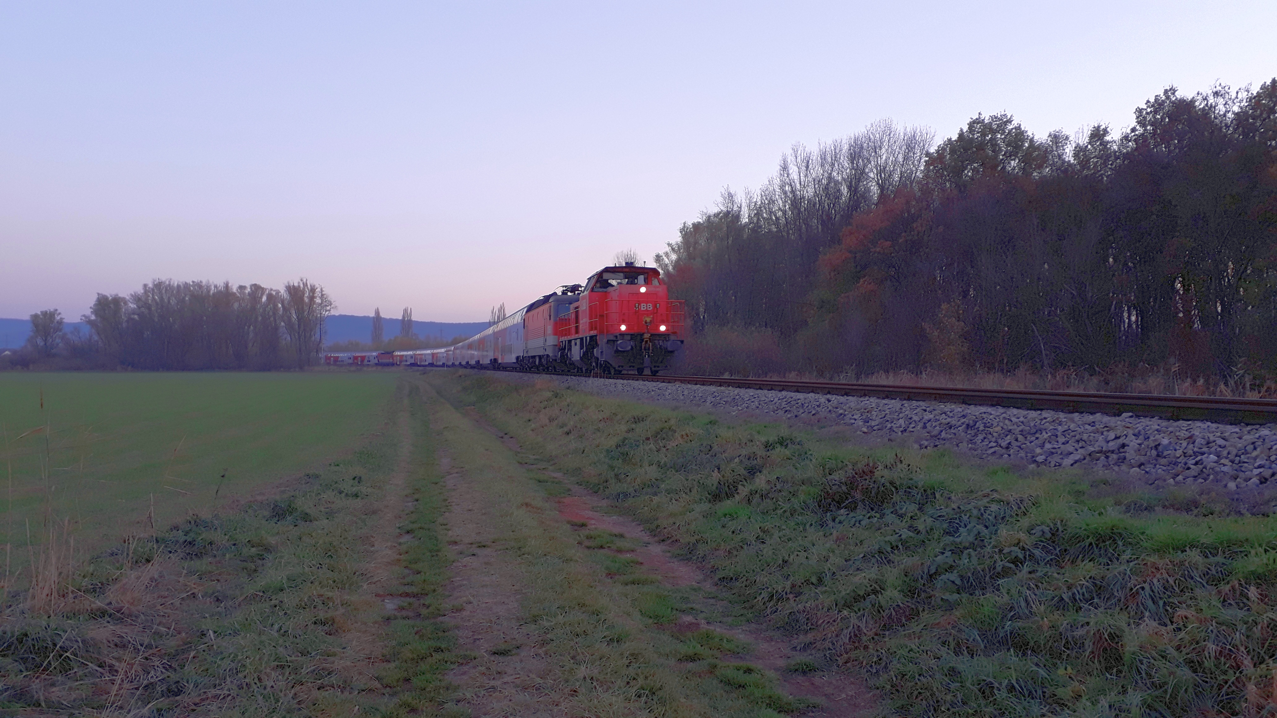 Der Wagenzug mit Triebfahrzeug 2070 051, 1144 111, 26-33 527, 26-33 127, 26-33 124, 26-33 140, 86-33 001; 86-33 003, 26-33 212, 26-33 247, 26-33 074, 1144 262; 86-33 018, 26-33 155, 26-33 029, 26-33 515, 1144 232 auf der Pulkautalbahn zwischen Alberndorf und Haugsdorf, mit Fahrtrichtung Zellerndorf.